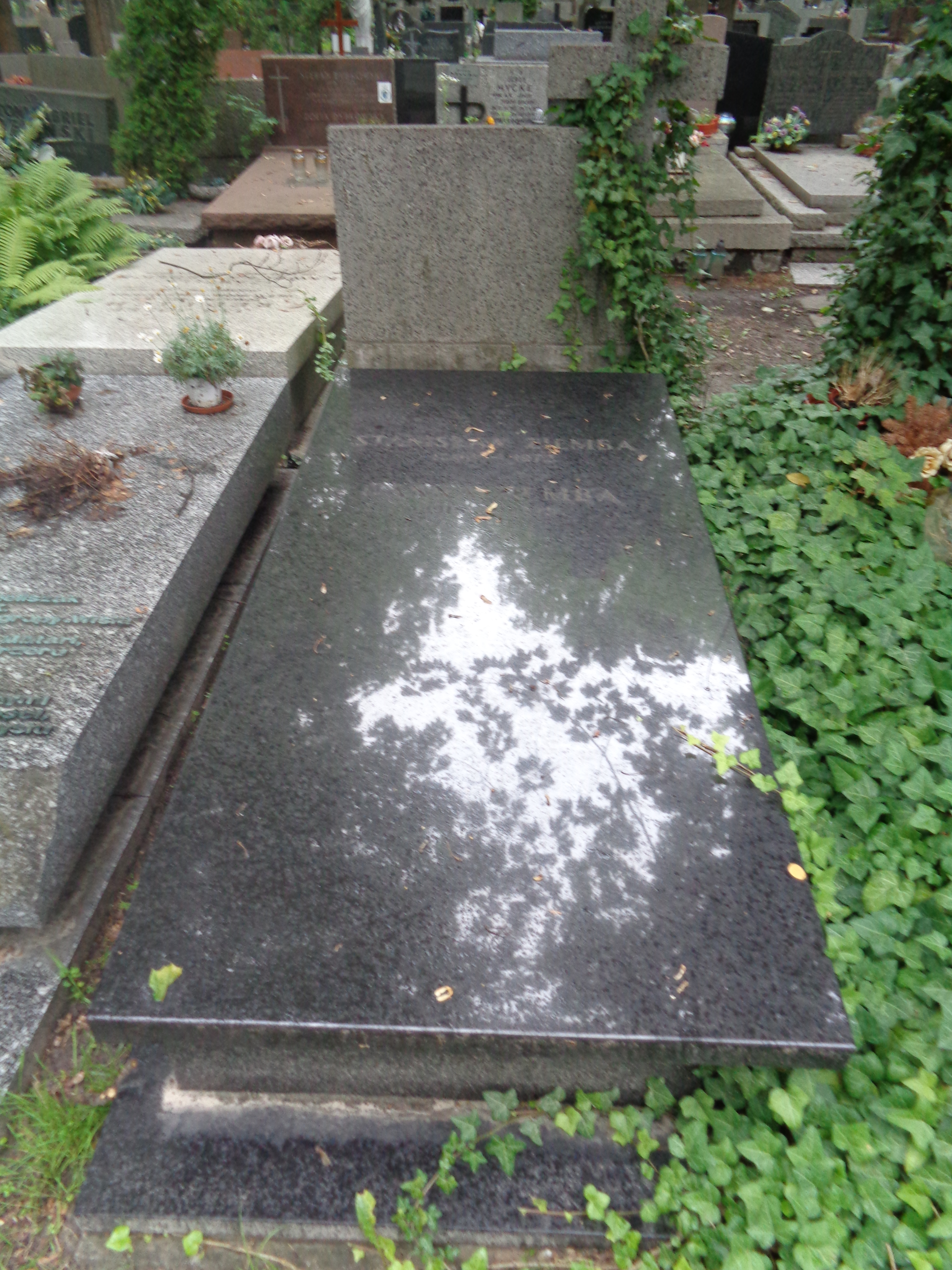 Grób Stanisława Zięby na Cmentarzu Wojskowym na Powązkach